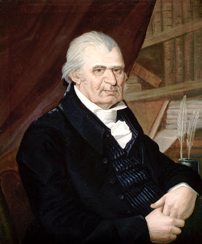 Joseph Papineau (1752-1841)